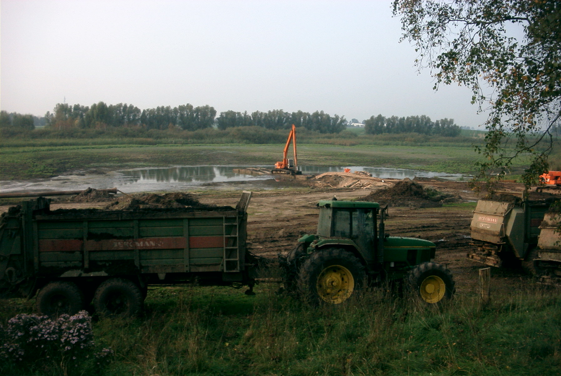 Regenerierung des Stresower Sees 2006, Ausbaggerung des verschlammten Sees